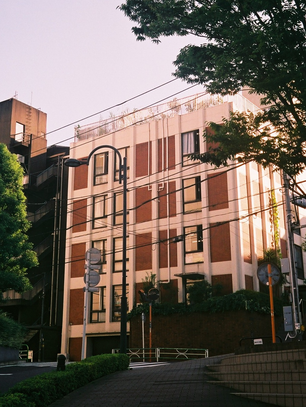 2017年撮影